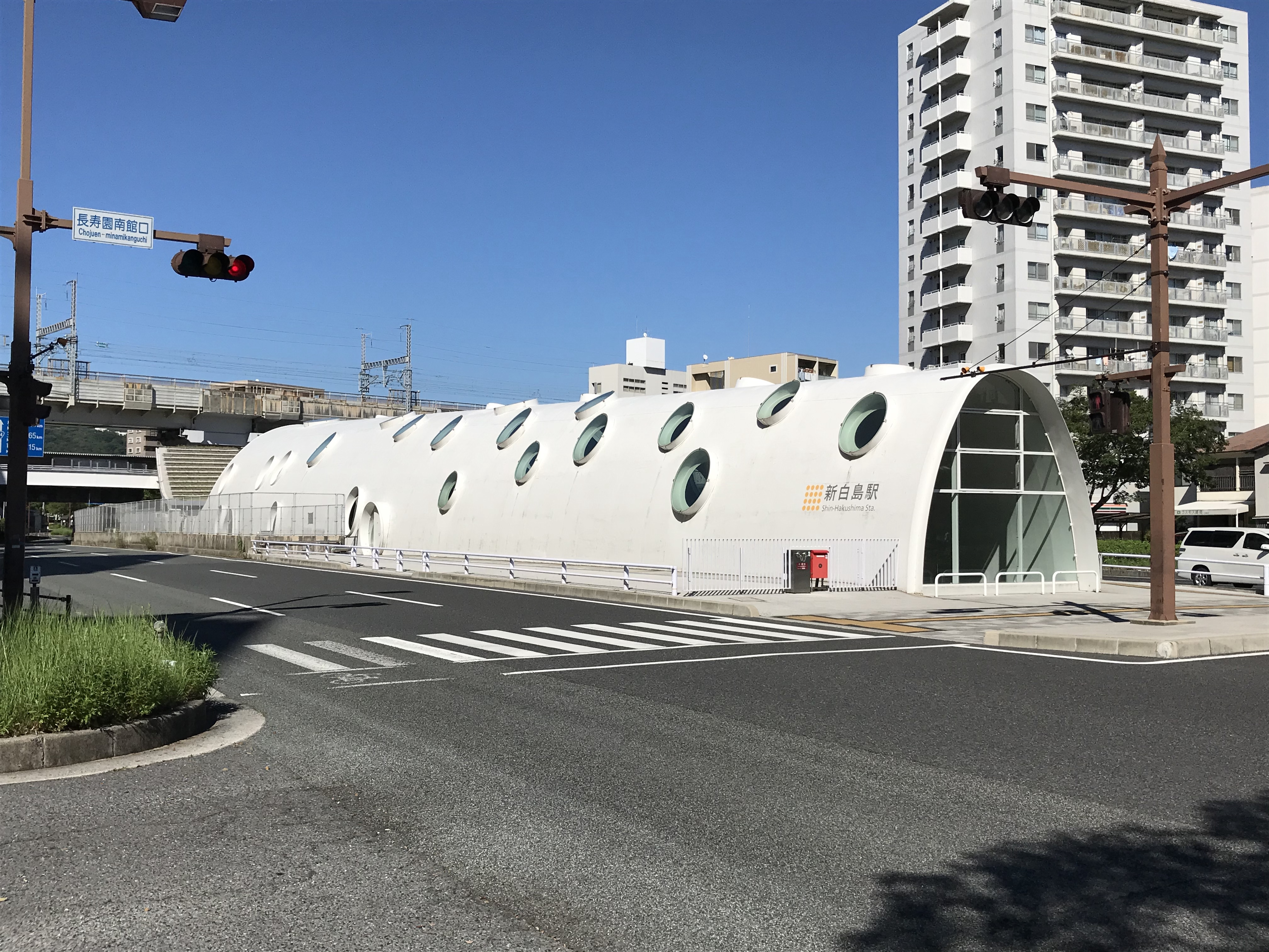 アストラムライン新白島駅駅舎